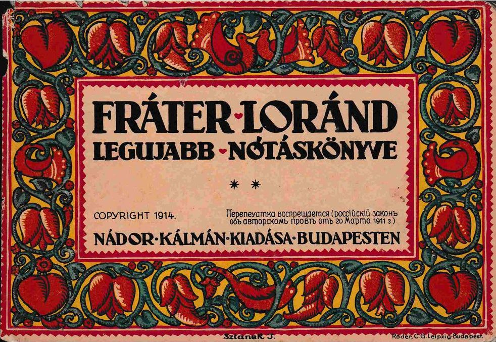 Fráter Lóránd legújabb nótáskönyve című könyv címlapja, 1914